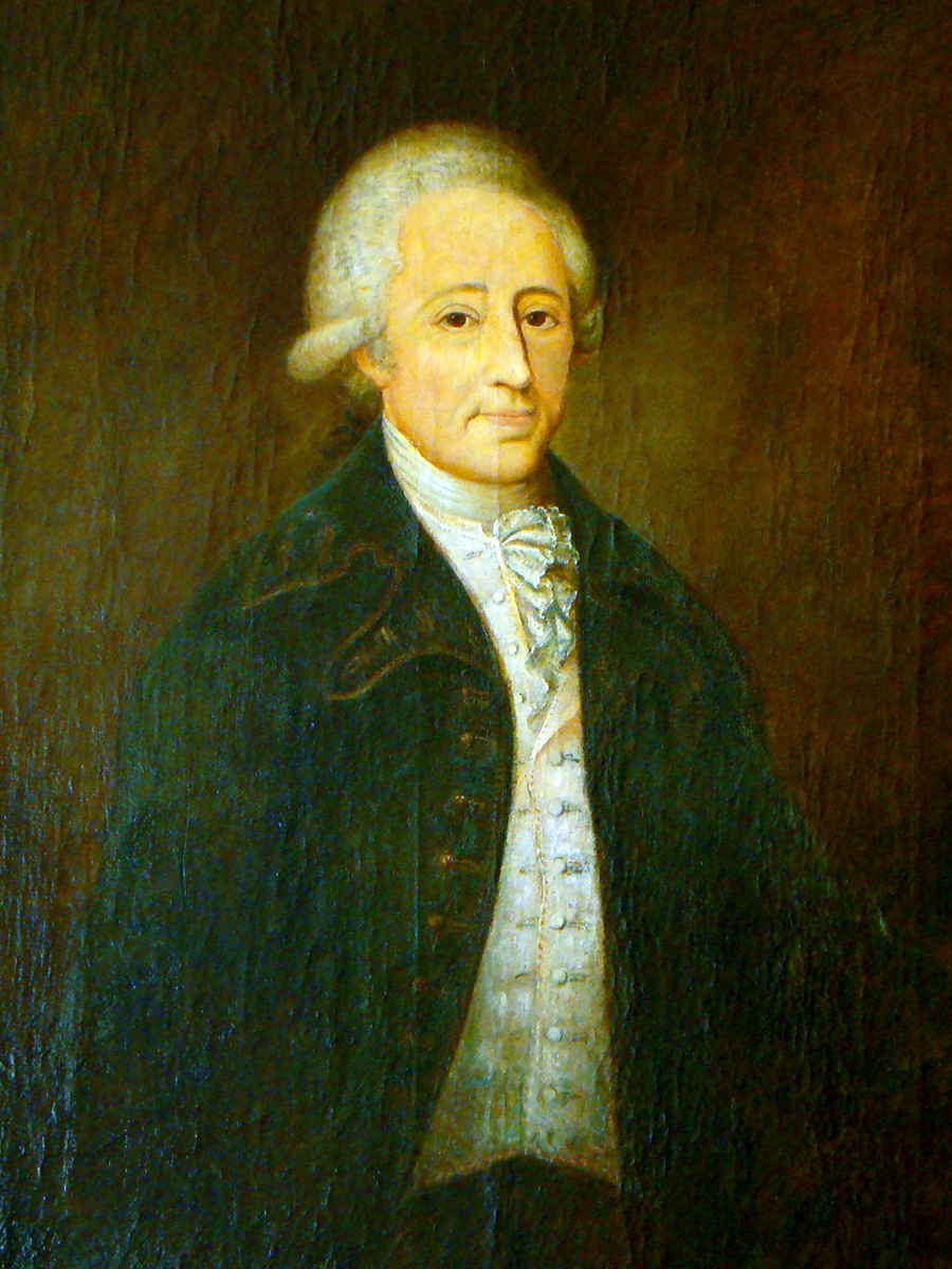 Georg Heinrich von Roßkampff, Bürgermeister von Heilbronn. Gemälde um 1770